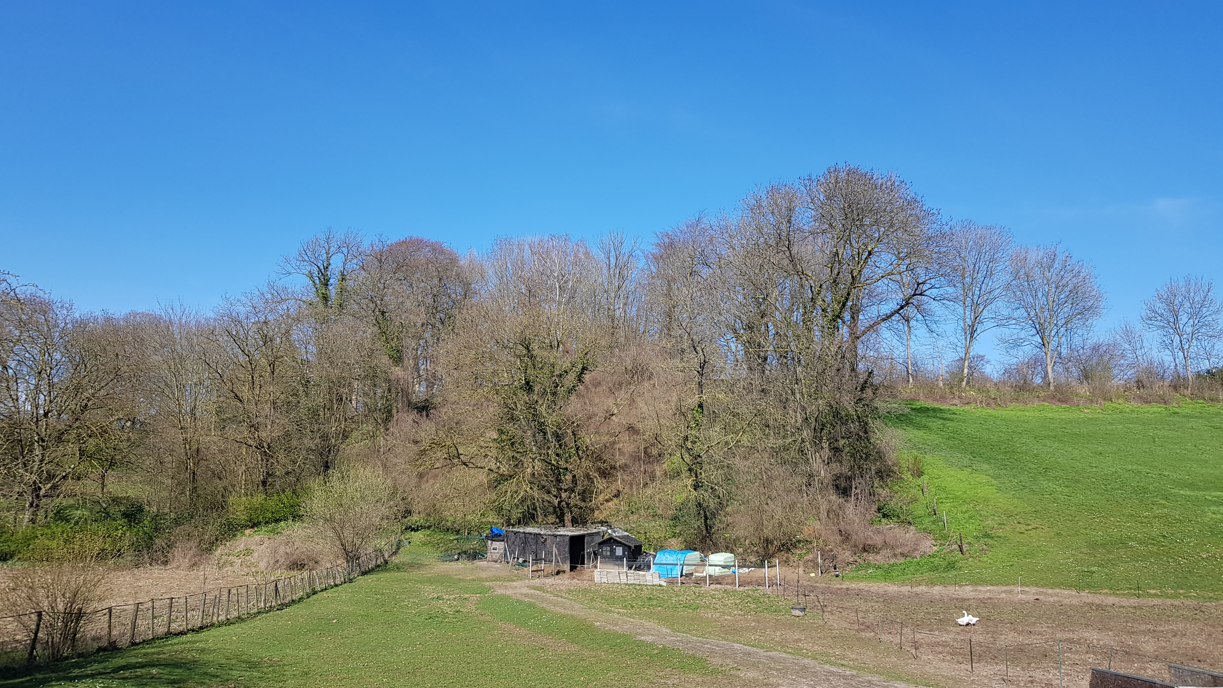 Groothofgroeve, Valkenburg aan de Geul, Nederland